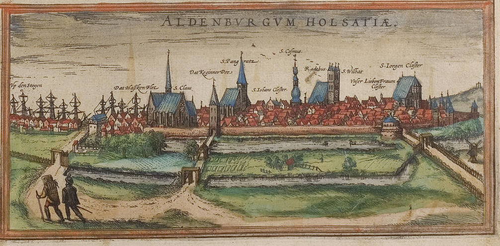 Stade (Überschrift fälschlich: "Aldenburgum")